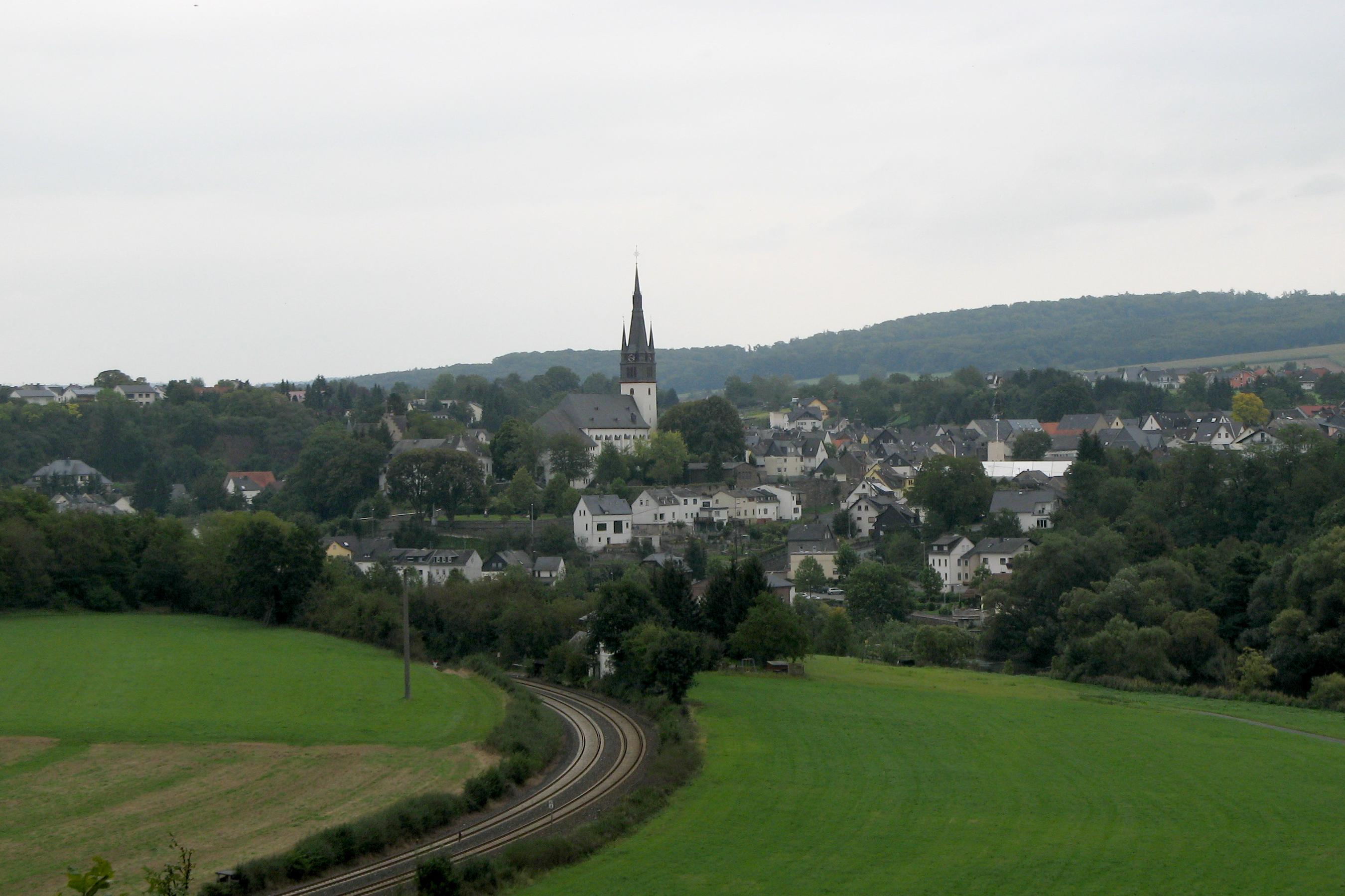 Ortsansicht von Villmar vom König Konrad Denkmal aus